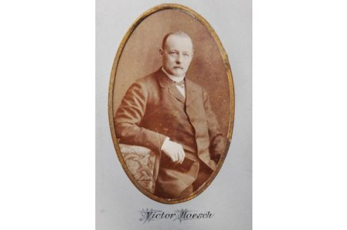 Portraitaufnahme